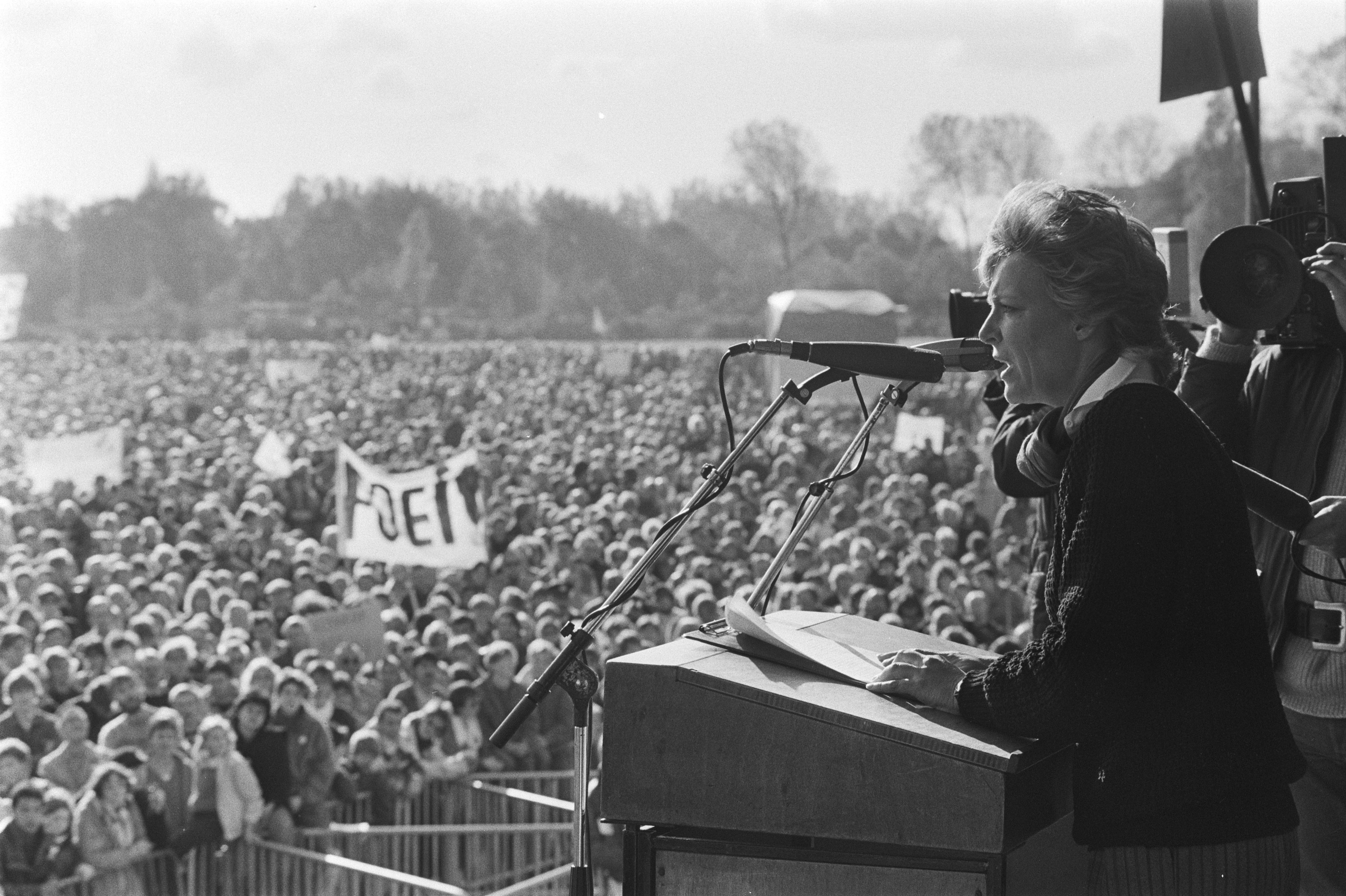 Collectie / Archief : Fotocollectie Anefo Reportage / Serie : Vredesdemonstratie Den Haag , 550.000 mensen demonstreren o.m. tegen plaatsing kruisrakette Beschrijving : Prinses Irene tijdens haar toespaak in het Zuiderpark Datum : 29 oktober 1983 Locatie : Den Haag, Zuid-Holland Trefwoorden : antikernwapenbeweging, betogingen, prinsessen, toespraken, vredesbeweging Persoonsnaam : Irene (prinses Nederland) Fotograaf : Croes, Rob C. / Anefo Auteursrechthebbende : Nationaal Archief Materiaalsoort : Negatief (zwart/wit) Nummer archiefinventaris : bekijk toegang 2.24.01.05 Bestanddeelnummer : 932-7488